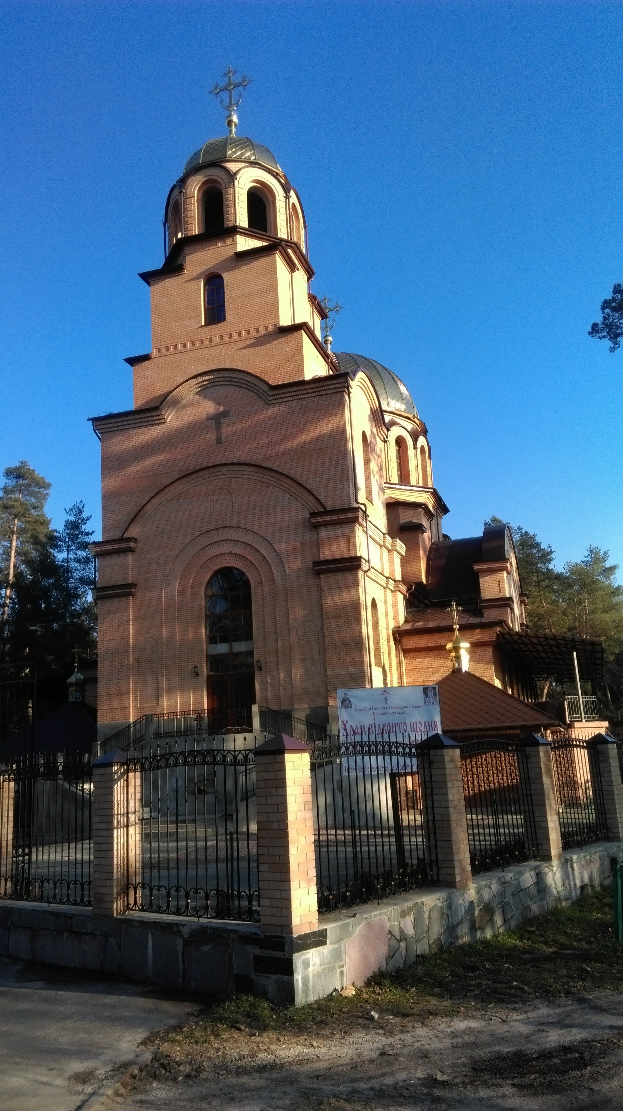 The Church of St. John of Kronstadt (Kyiv)